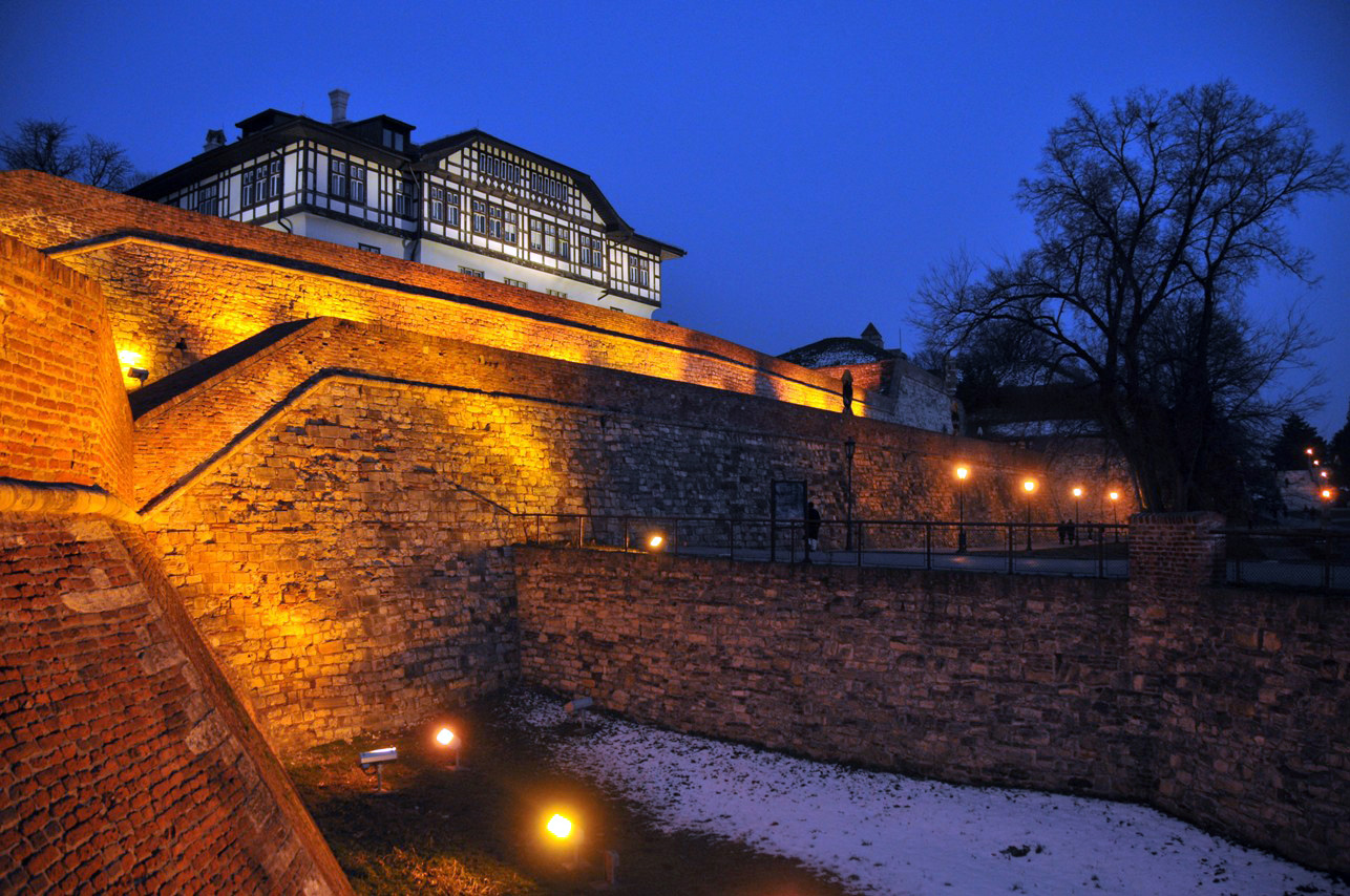 Kalemegdan, Belgrade, Serbia by night